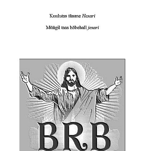 Jeesusteippi (2014)